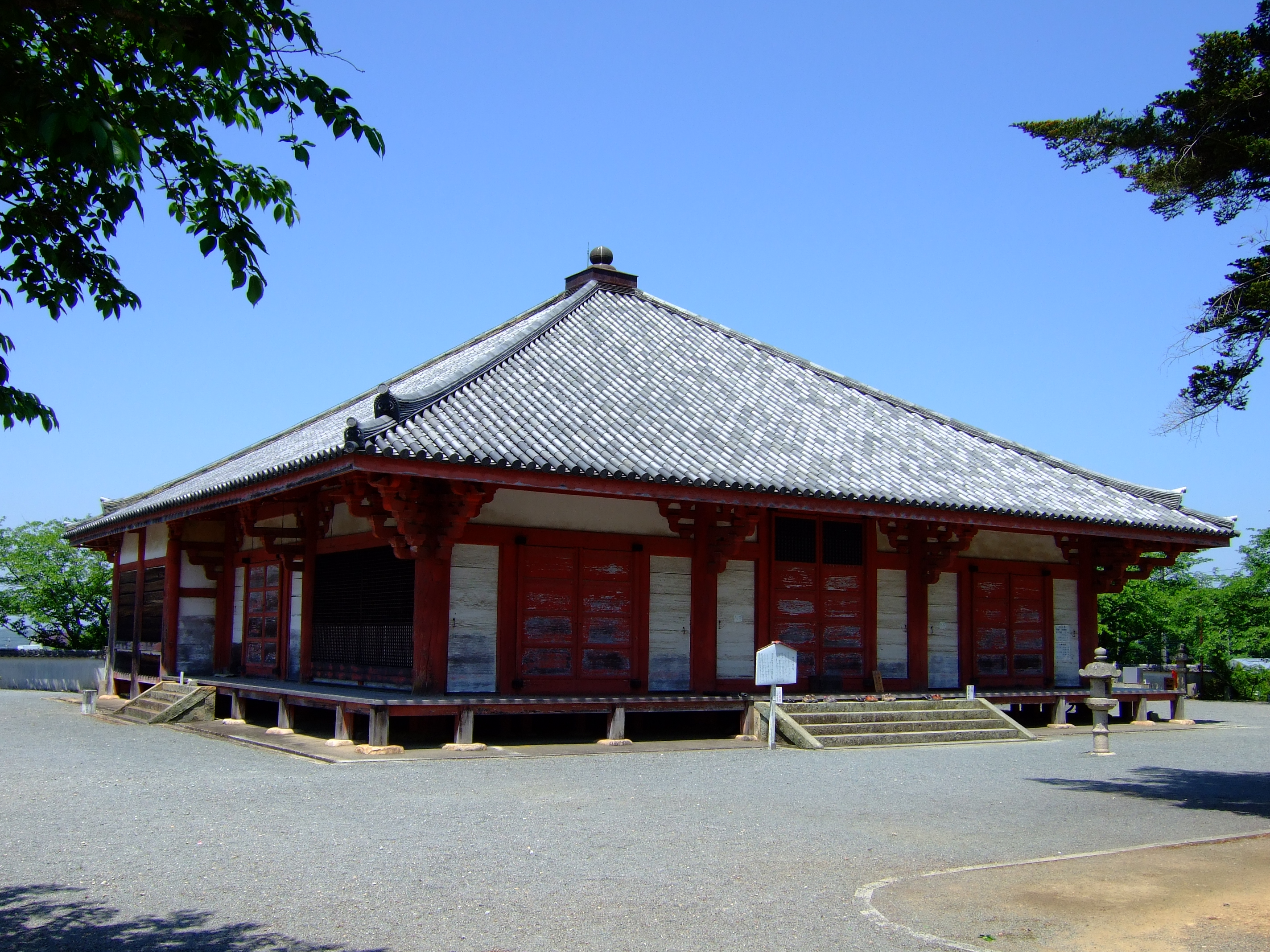 浄土寺 (小野市)本堂 （国宝）